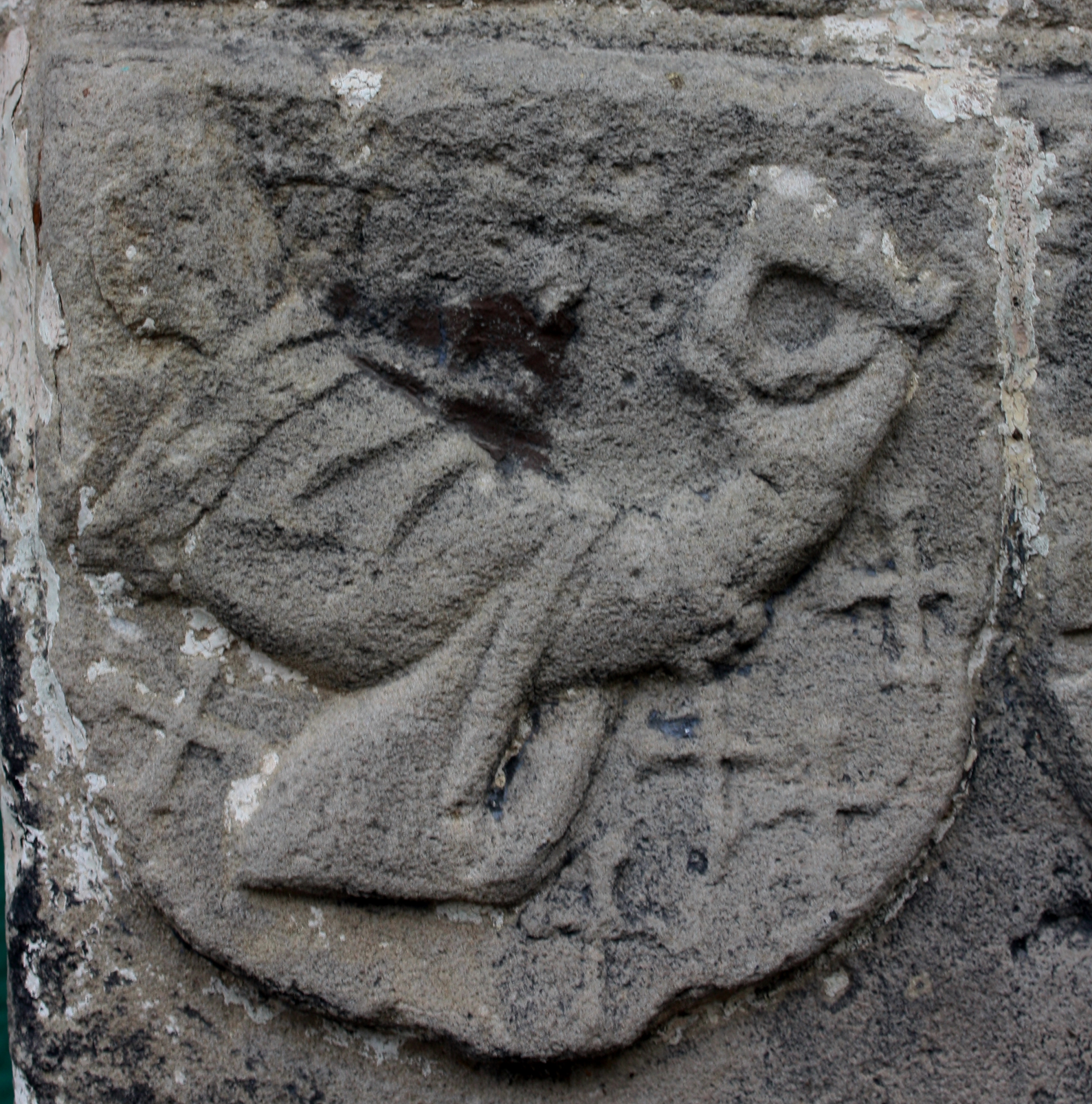 Wappen der Ritter von Lösnich als Ahnenprobe auf einem Votivkreuz des Ritters Cuno von Pyrmont von 1446 in Brodenbach an der Mosel.